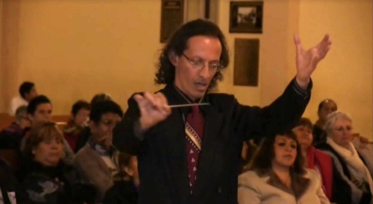 Dirigiendo la banda de la ACMUSIQ en Ica